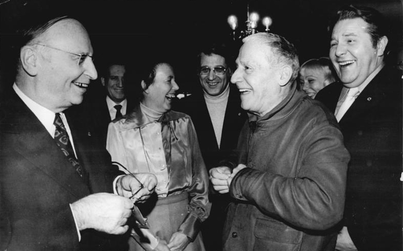 ADN-ZB Katscherowki-15.12.74 Berlin: Solidaritätskonzert im "Berliner Ensamble" Freundschaftliches Gespräch zwischen dem Mitglied des Politbüros und Sekretär des ZK der SED, Kurt Hager (l.) und Paul Dessau (2.v.lr.) im Foyer des "Berliner Ensemble". Am 15.12. veranstalteten Künstler aus dem In- und Ausland ein Solidaritätskonzert zum bevorstehenden 80. Geburtstag von Paul Dessau. V.l.n.r.: Kurt Hager, Ruth Berghaus, Intendatin des "Berliner Ensambles"; Werner Rackwitz, Stellvertreter des Ministers für Kultur der DDR; Paul Dessau und Hans-Joachim Hoffmann, Minister für Kultur der DDR.